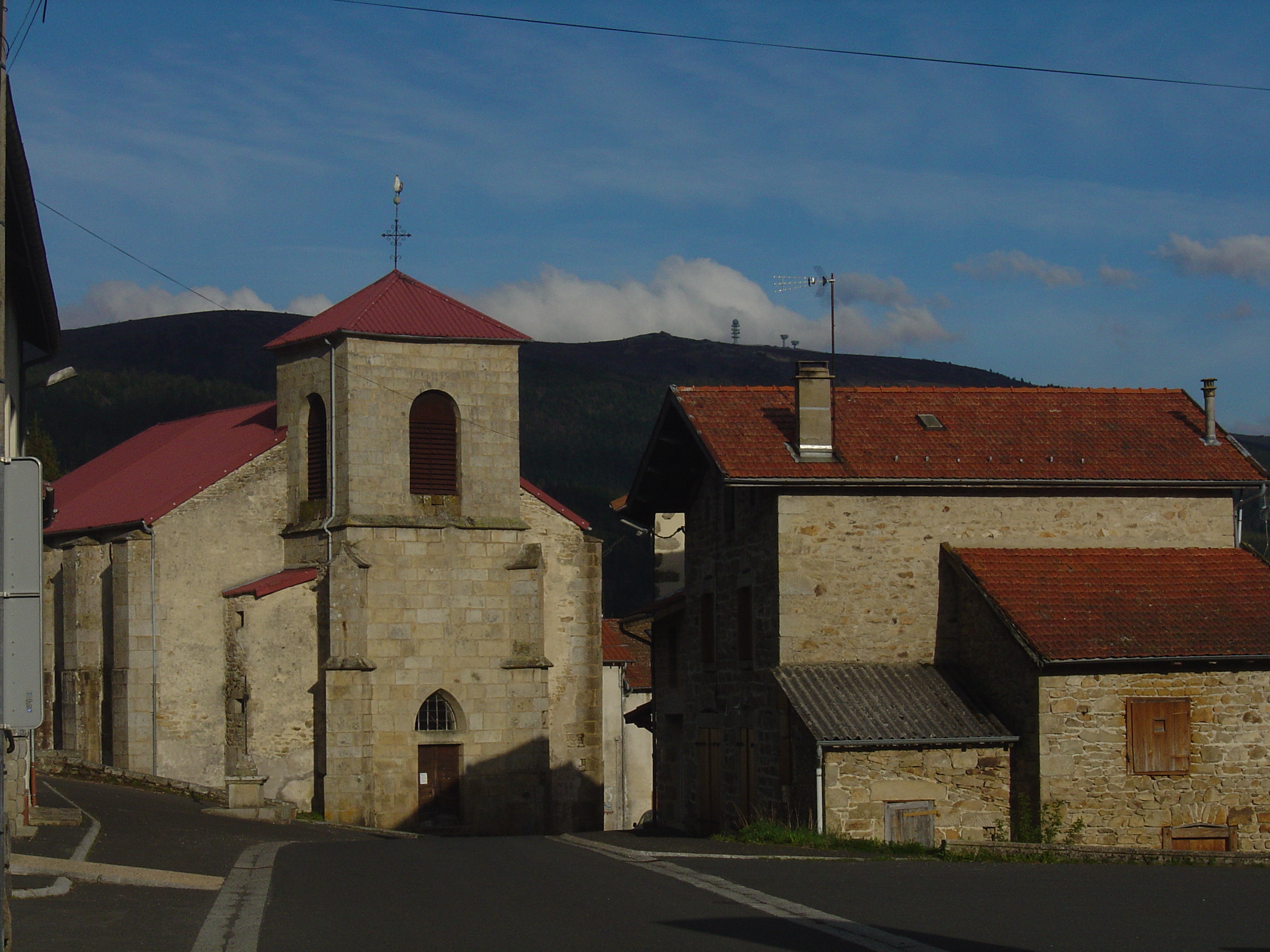 Eglise de Saint-Pierre la Bourlhonne